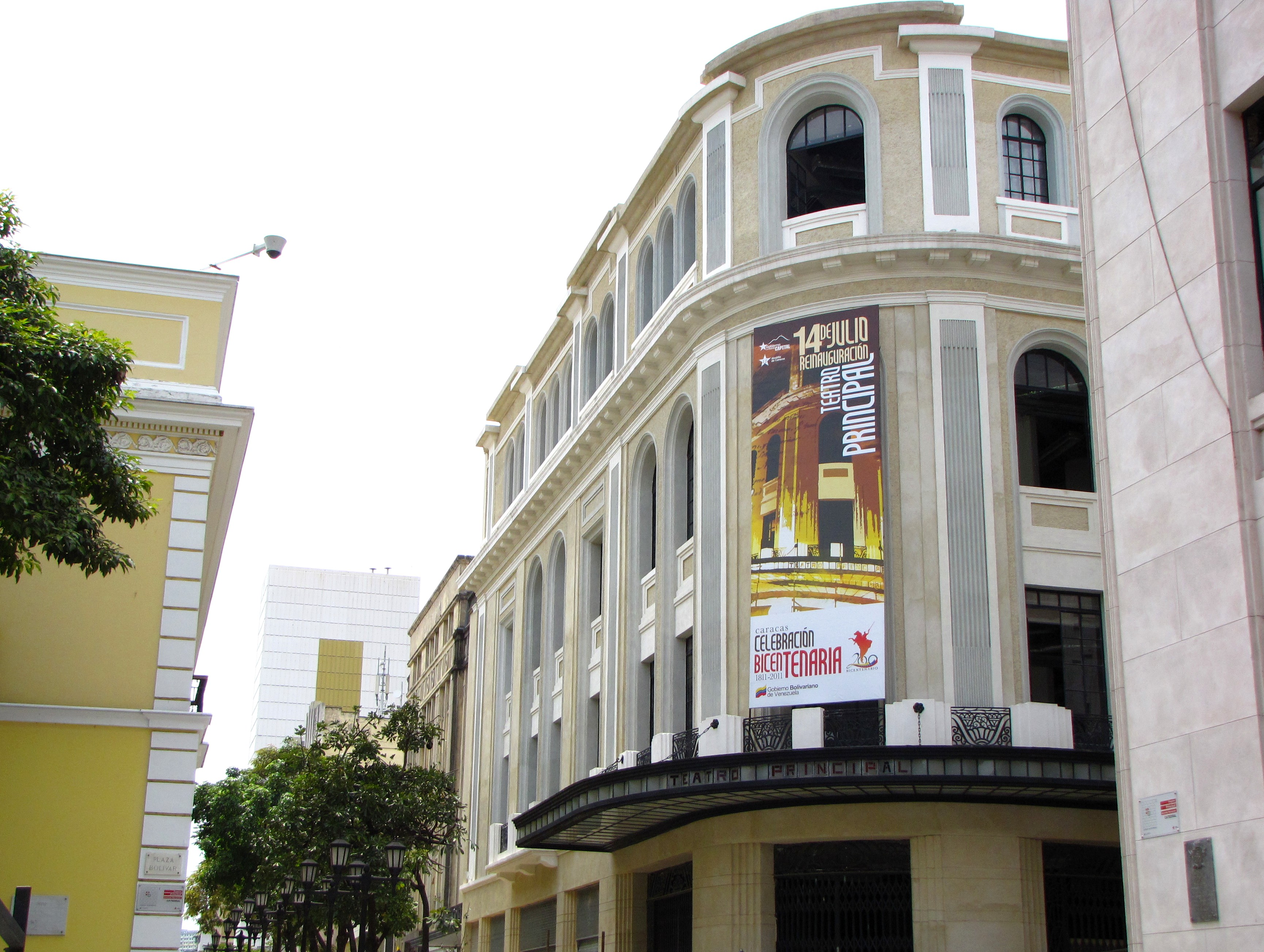 Lugar: Caracas, Venezuela.